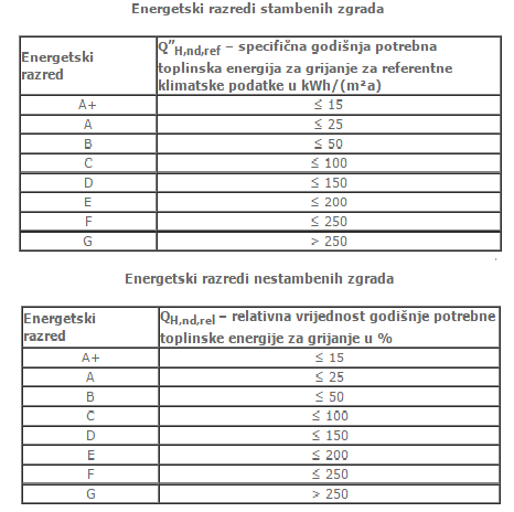 Energetski razredi